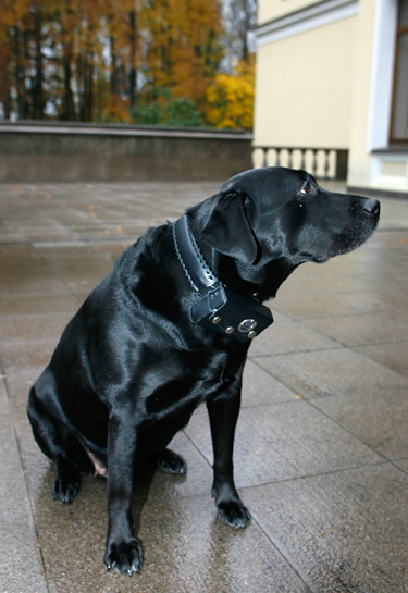 Лабрадор Премьер-министра Владимира Путина (Кони) в ошейнике, оснащенном навигационной системой ГЛОНАСС